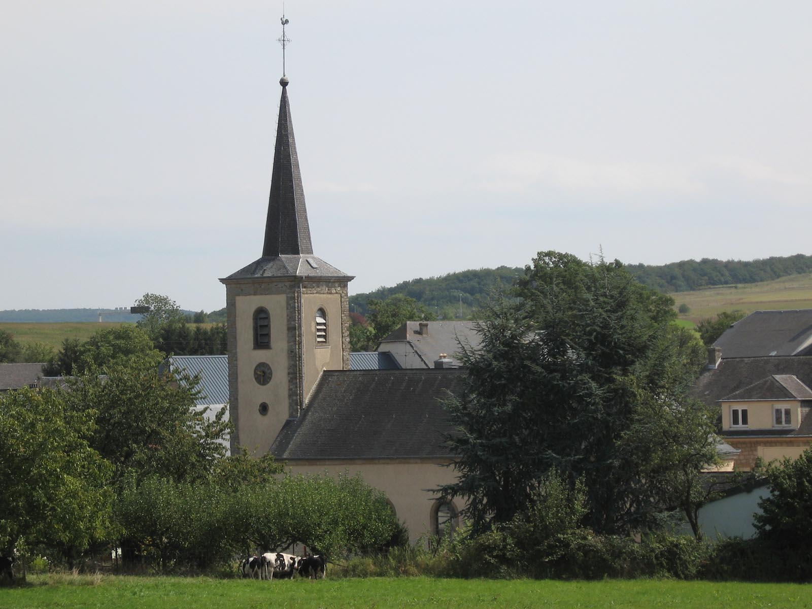 L'église de Burmerange (Luxembourg)